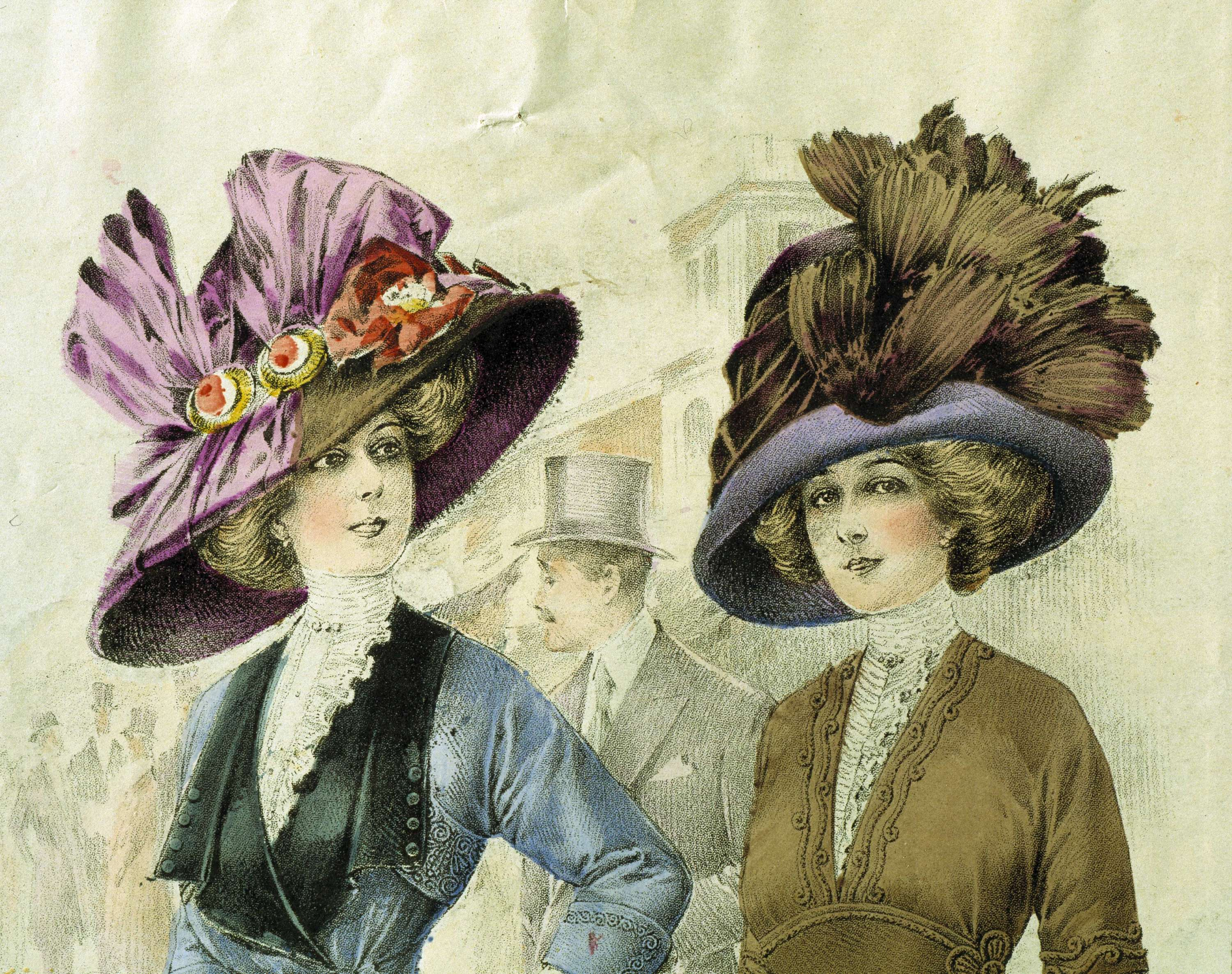 NMA.0033994 Mode. Hattar. Modeplansch från 1911. Foto Brånvall, Birgit / Nordiska museet